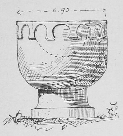 Taufstein aus dem 13. Jahrhundert. Zeichnung von C. Gurlitt 1894